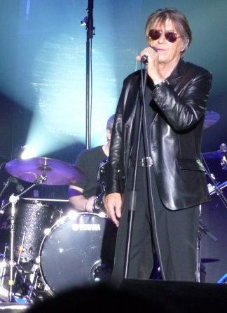 Jacques Dutronc en concert à Lorient.